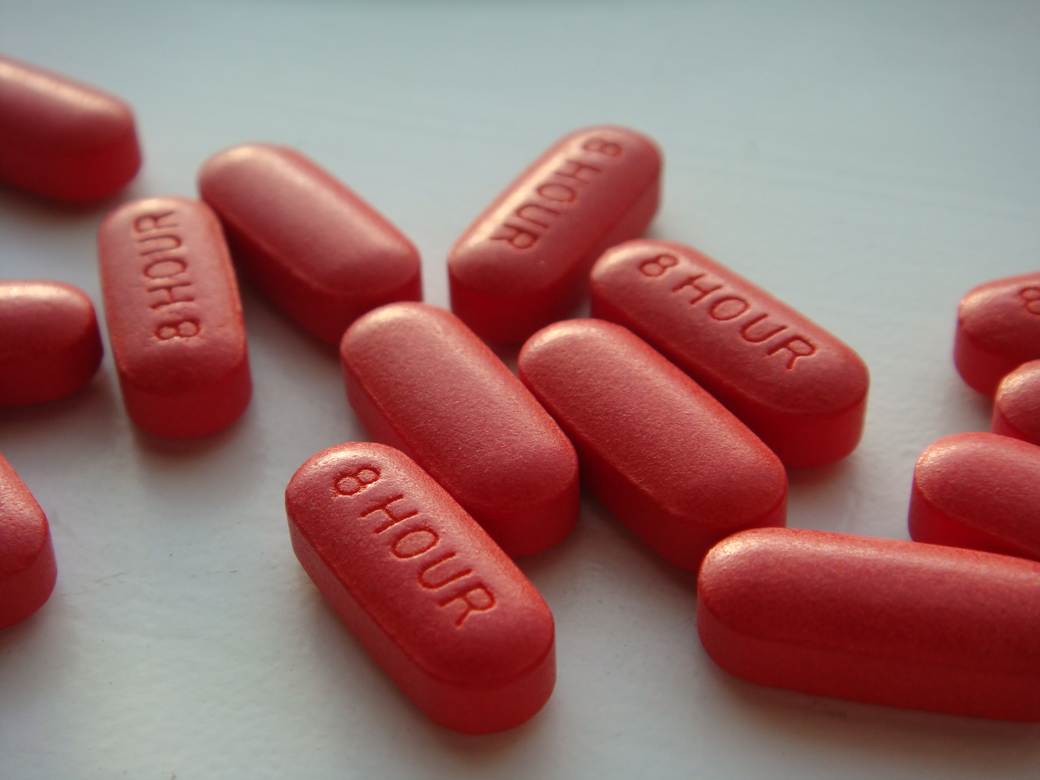 tylenol 8 hour pills closeup